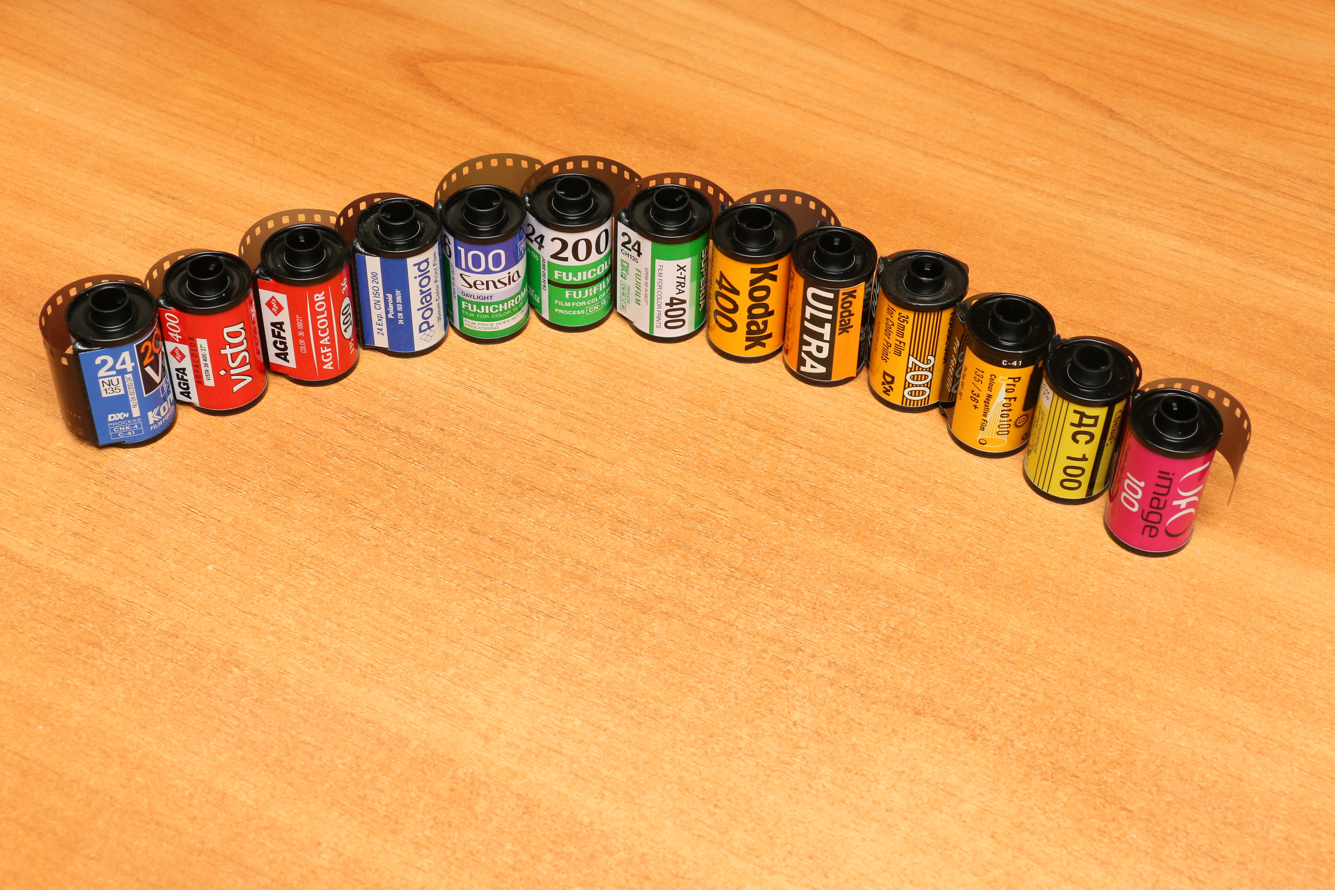 Кольорові негативні (Fuji Sensia – позитивна) фотоплівки, тип 135.